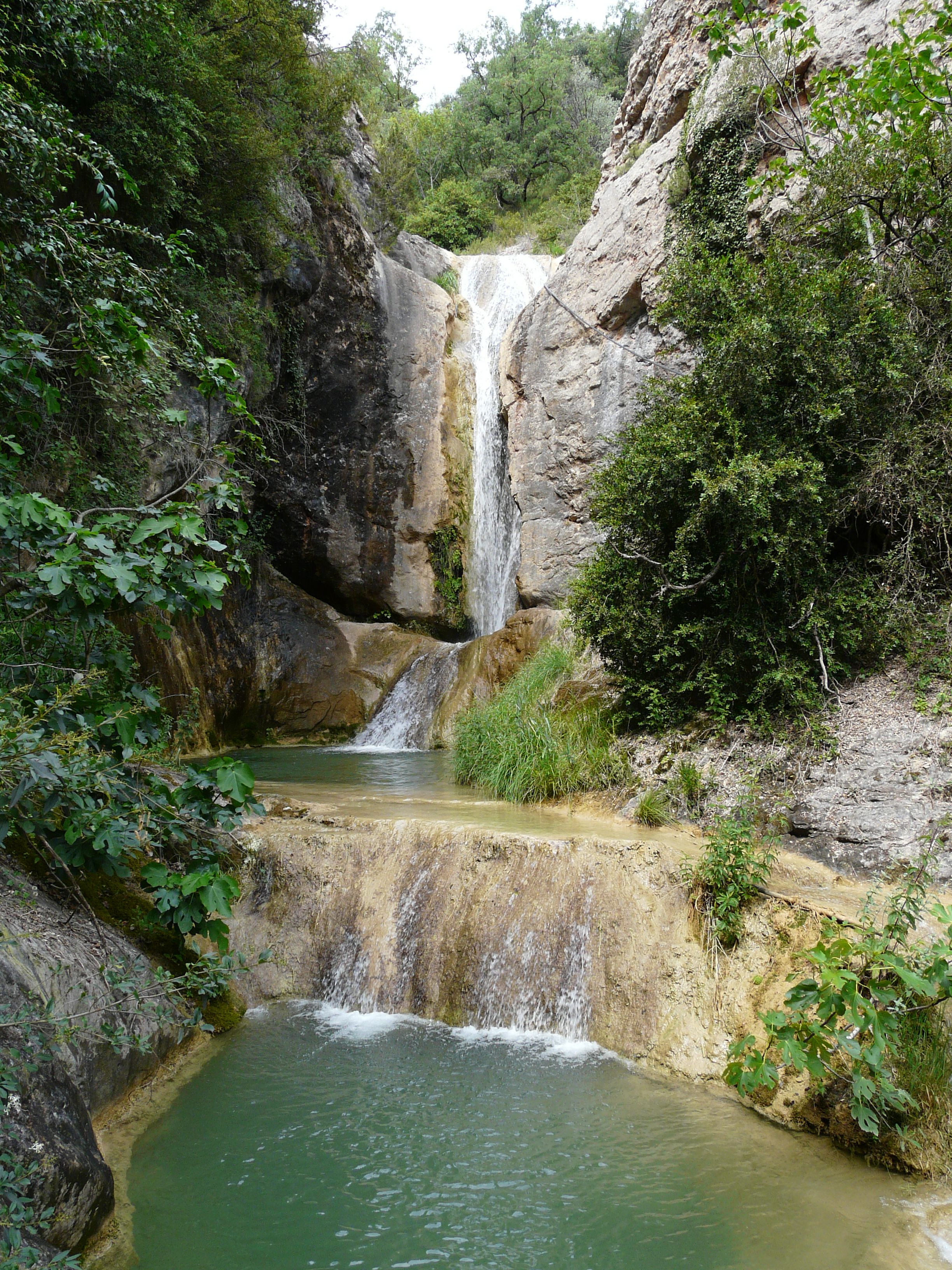 Riu de Conques (Pallars Jussà)